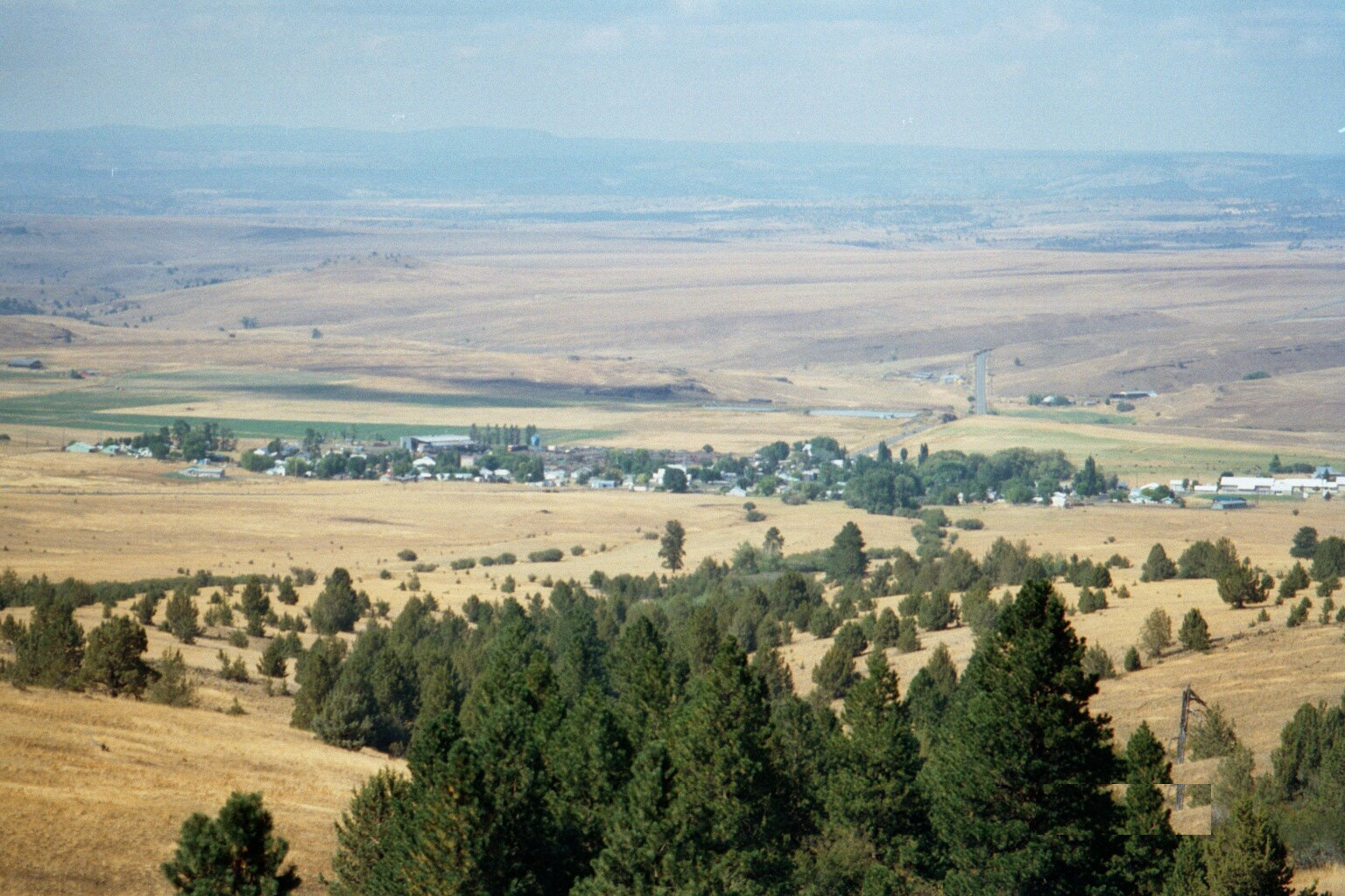 Near Ukiah, Oregon